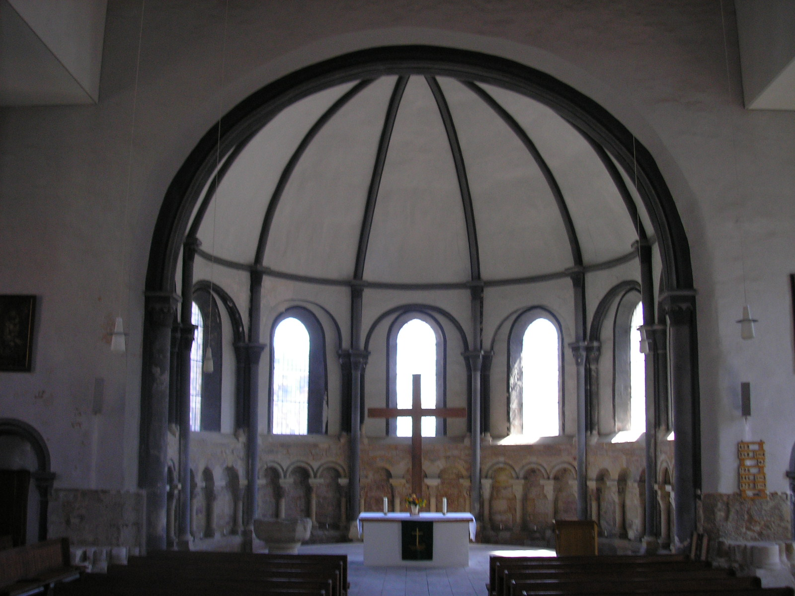 Die Apsis der Stadtkirche in Creuzburg (Thüringen).